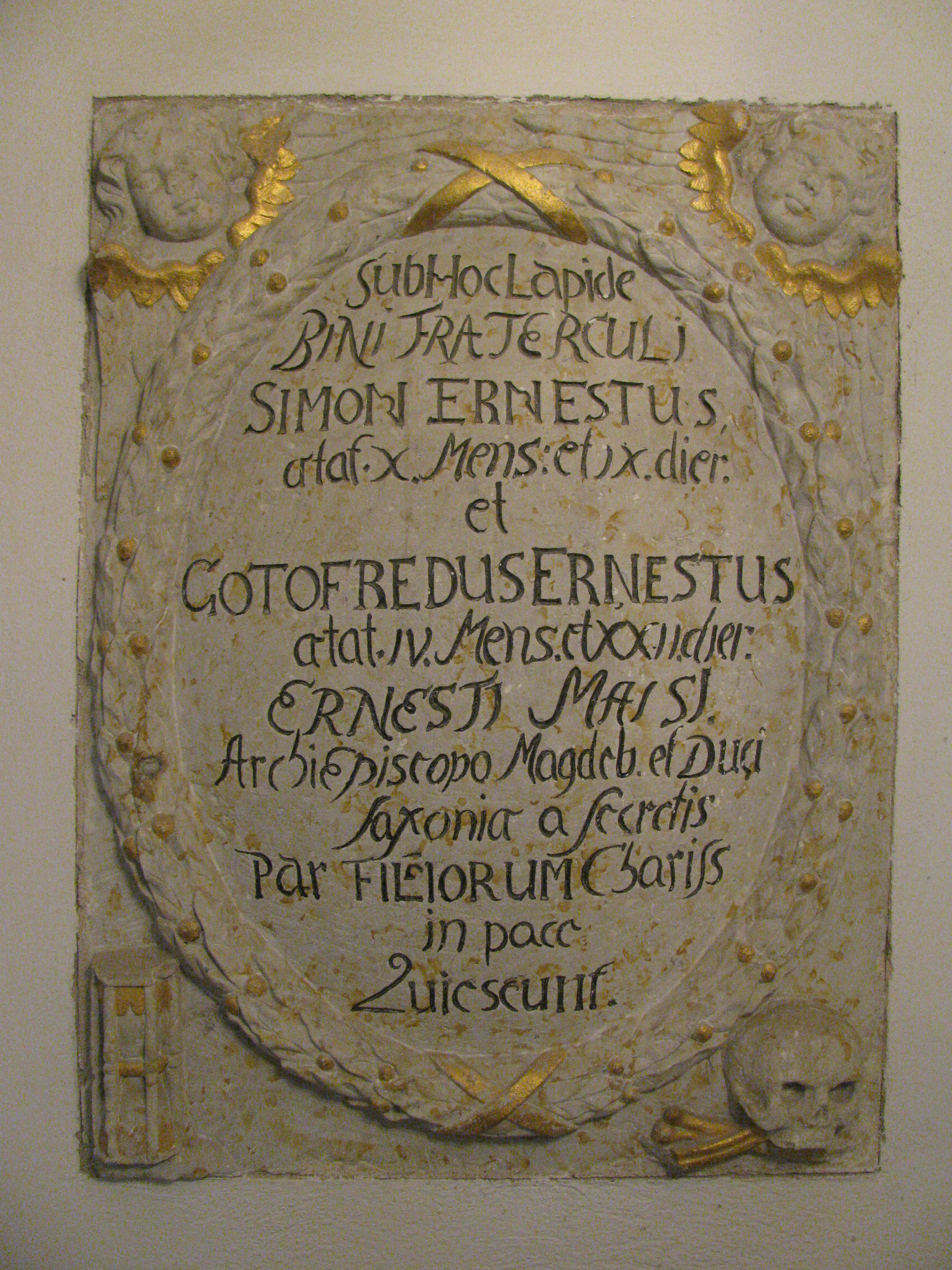 Leubnitzer Kirche Innenausstattung